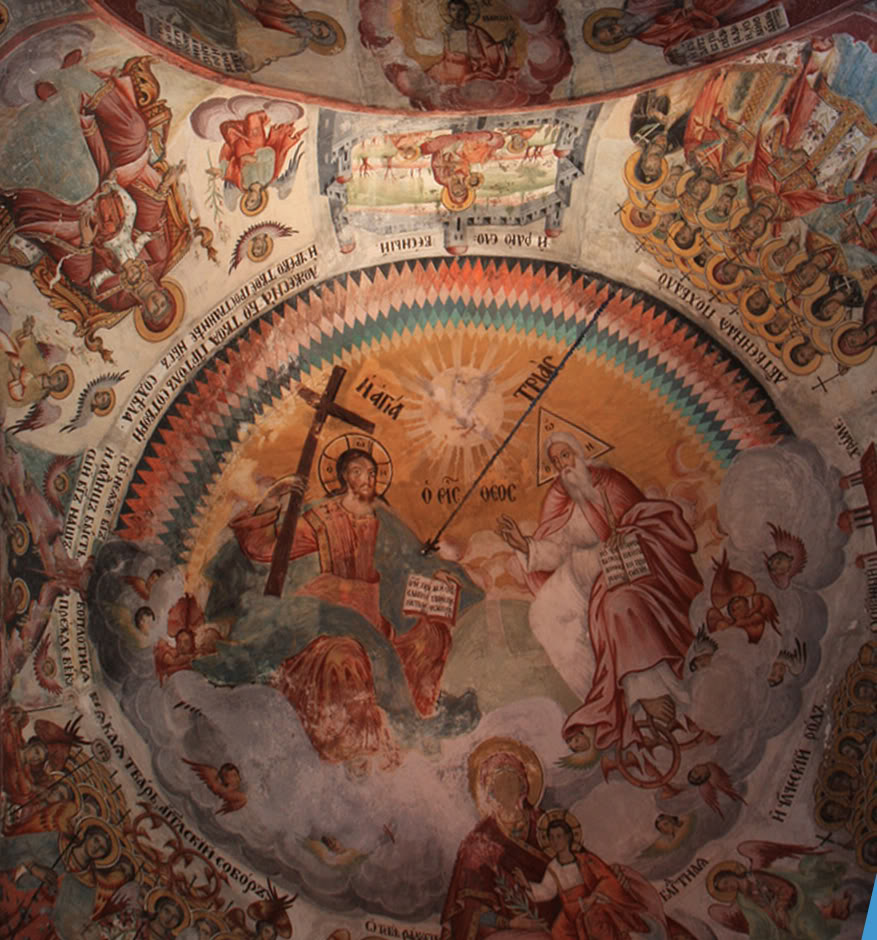 Фреска на Светата Троица от купола на една от пристройките на манастирската църква в манастира Трескавец, Прилепско, Република Македония.